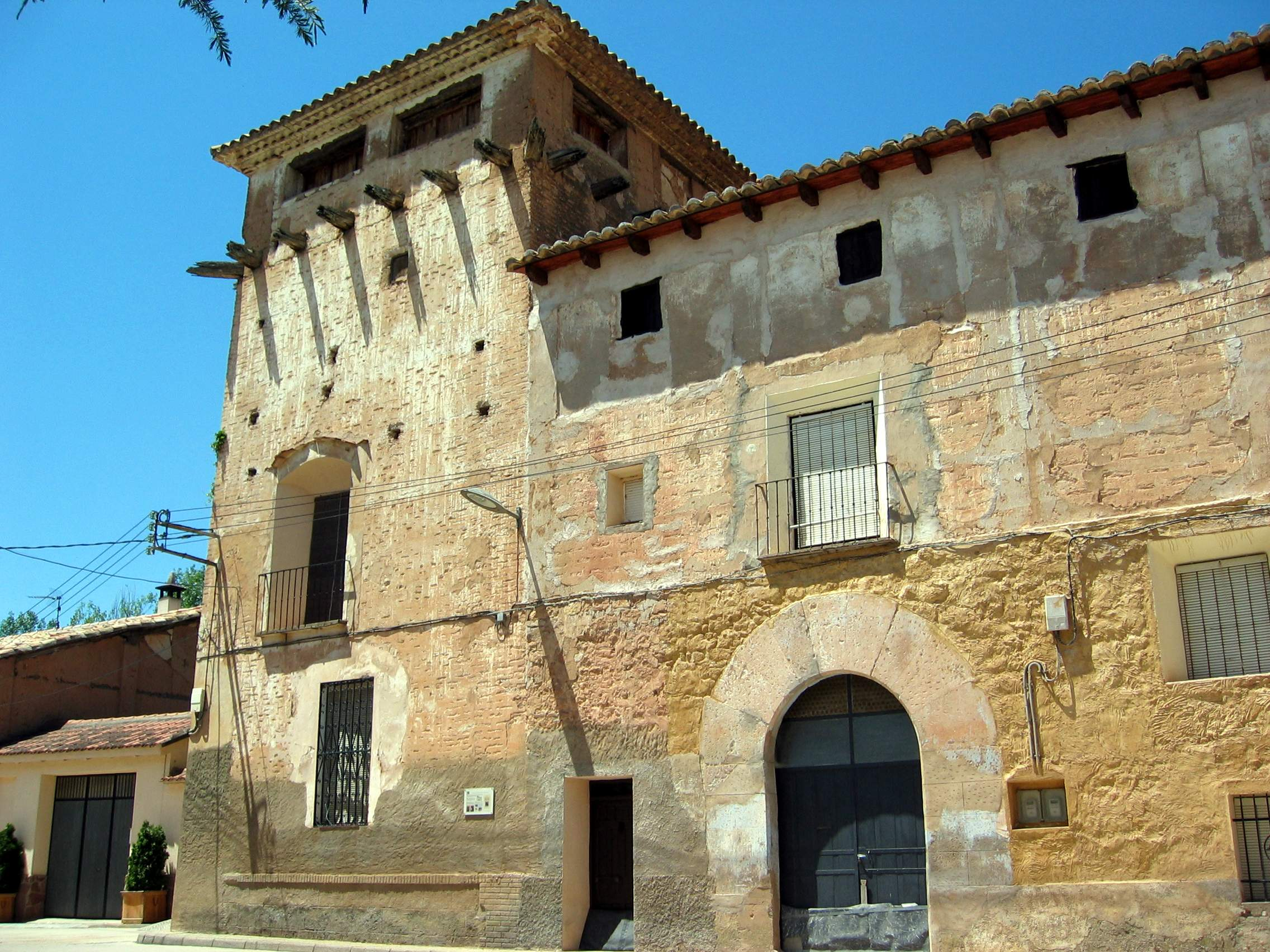 Vista frontal del torreón y Casa Grande de Torrealta, desde la plaza